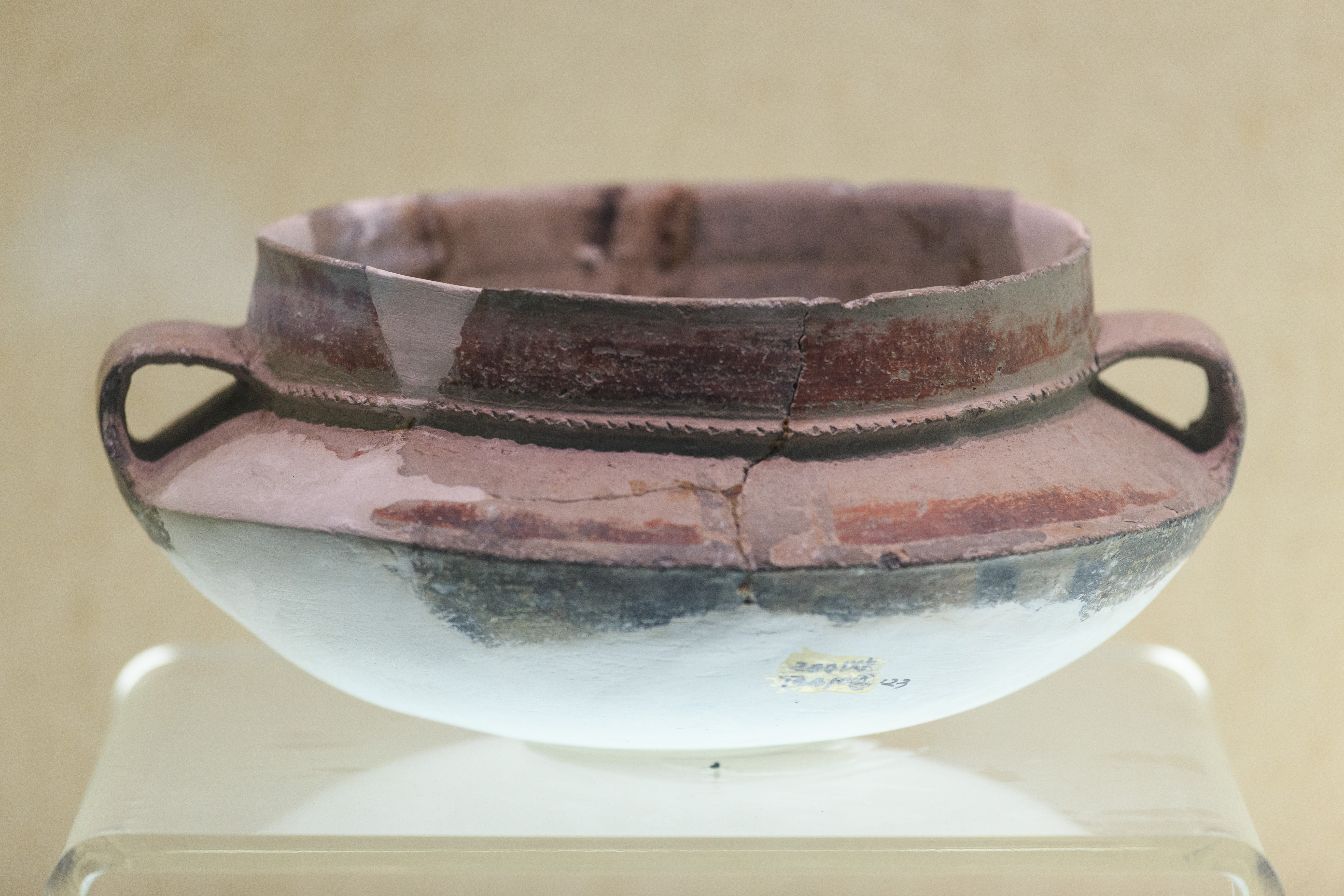 浙江省博物馆孤山馆区—— 大口双耳罐，跨湖桥遗址出土